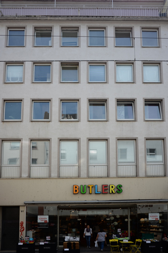 Stolpersteine Dortmund